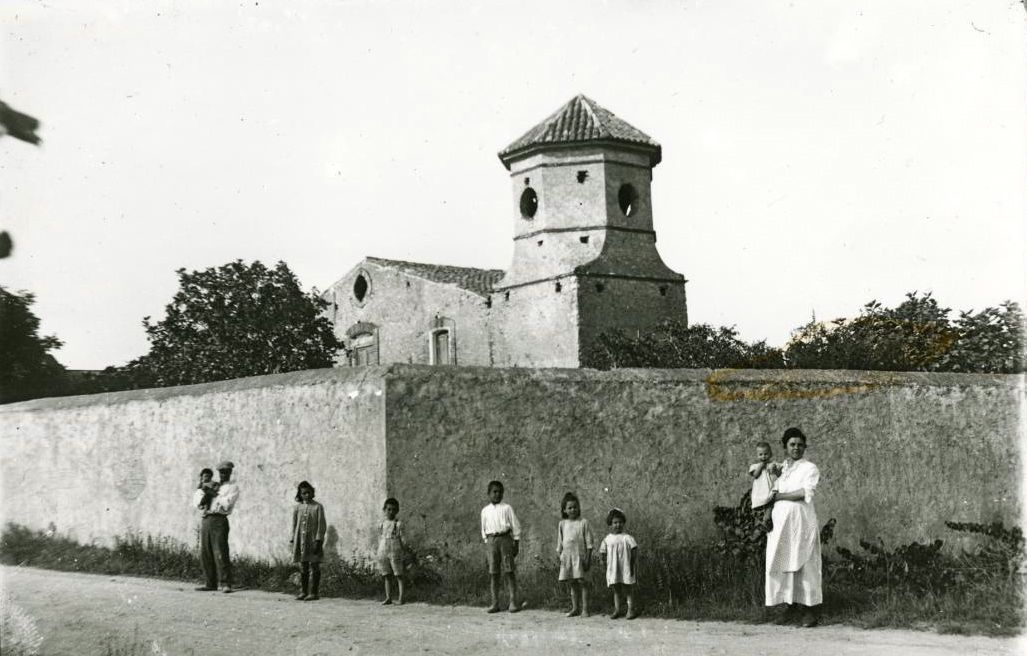 Convent dels frares paüls a Reus